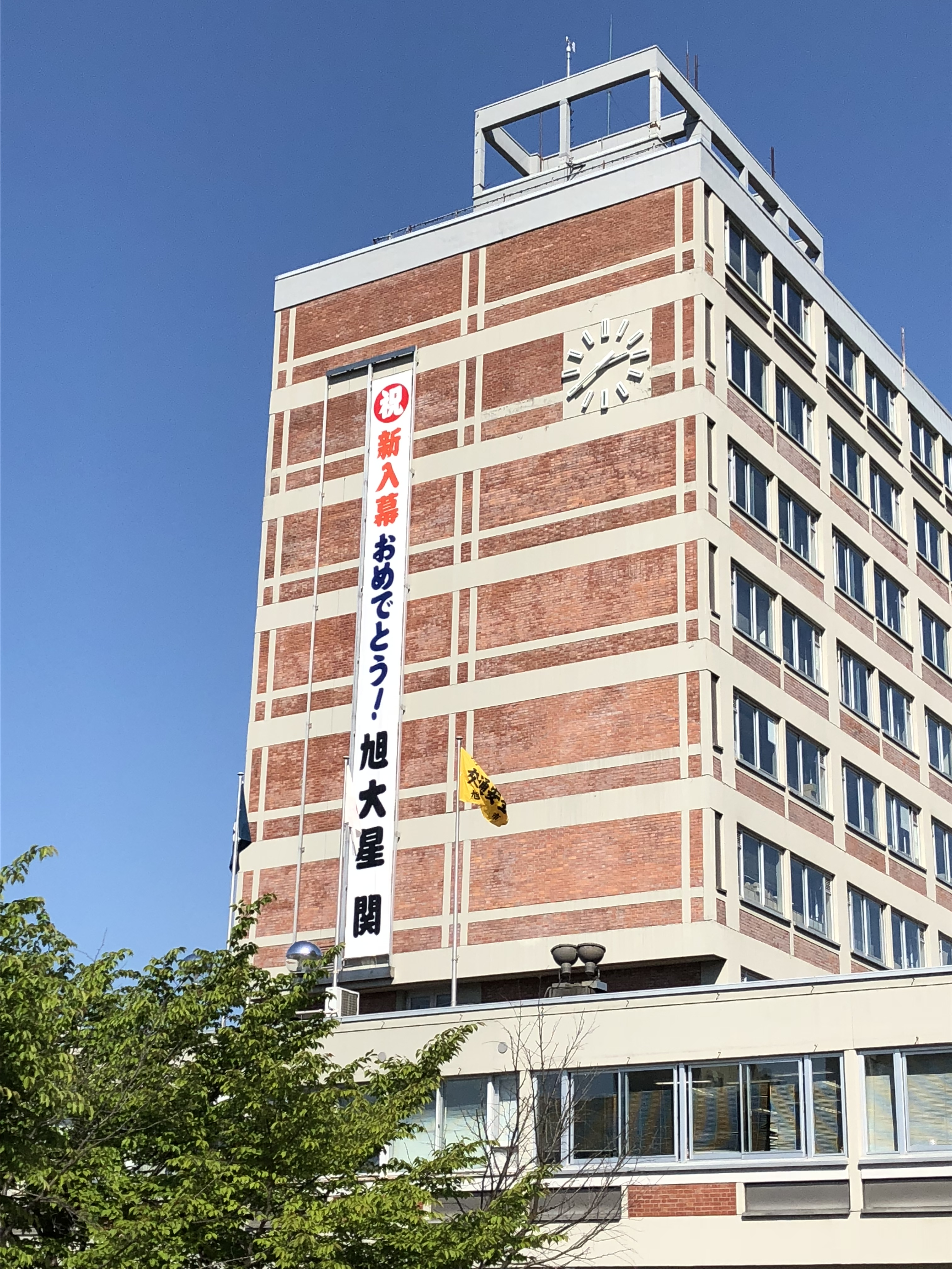 旭大星託也の初入幕を祝う垂れ幕が下げられたja:旭川市役所